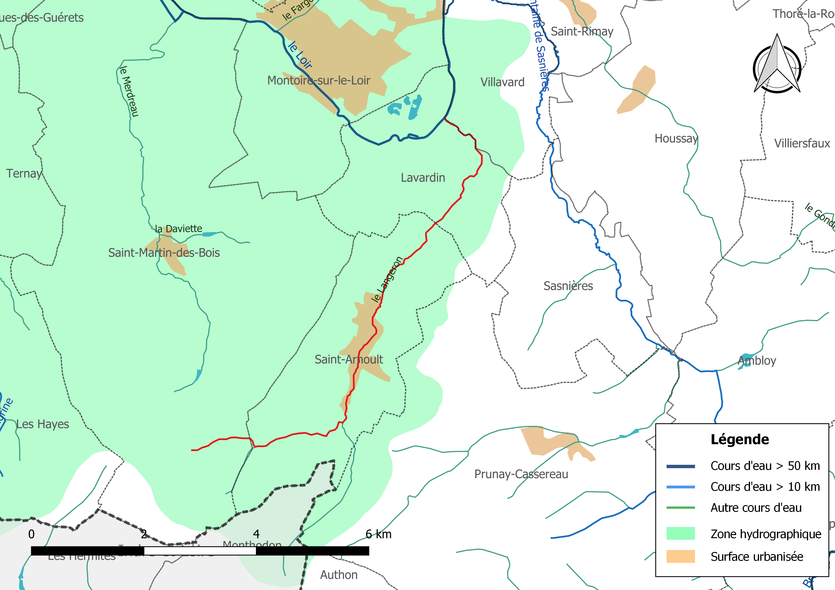 Carte du cours d'eau « le Langeron » et de son bassin versant (zone hydrographique dans laquelle il s'insère).